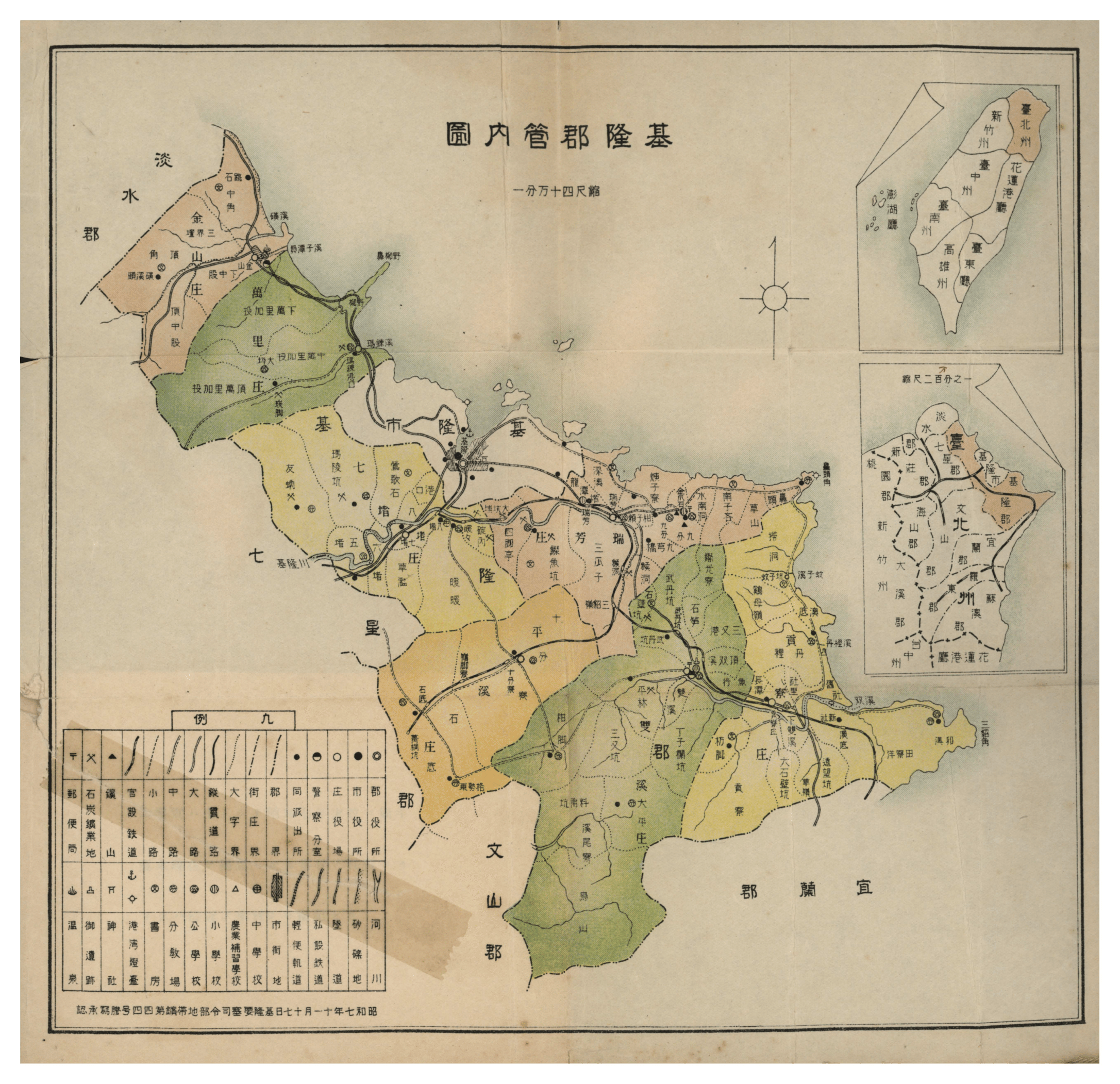 1933年基隆郡管內圖